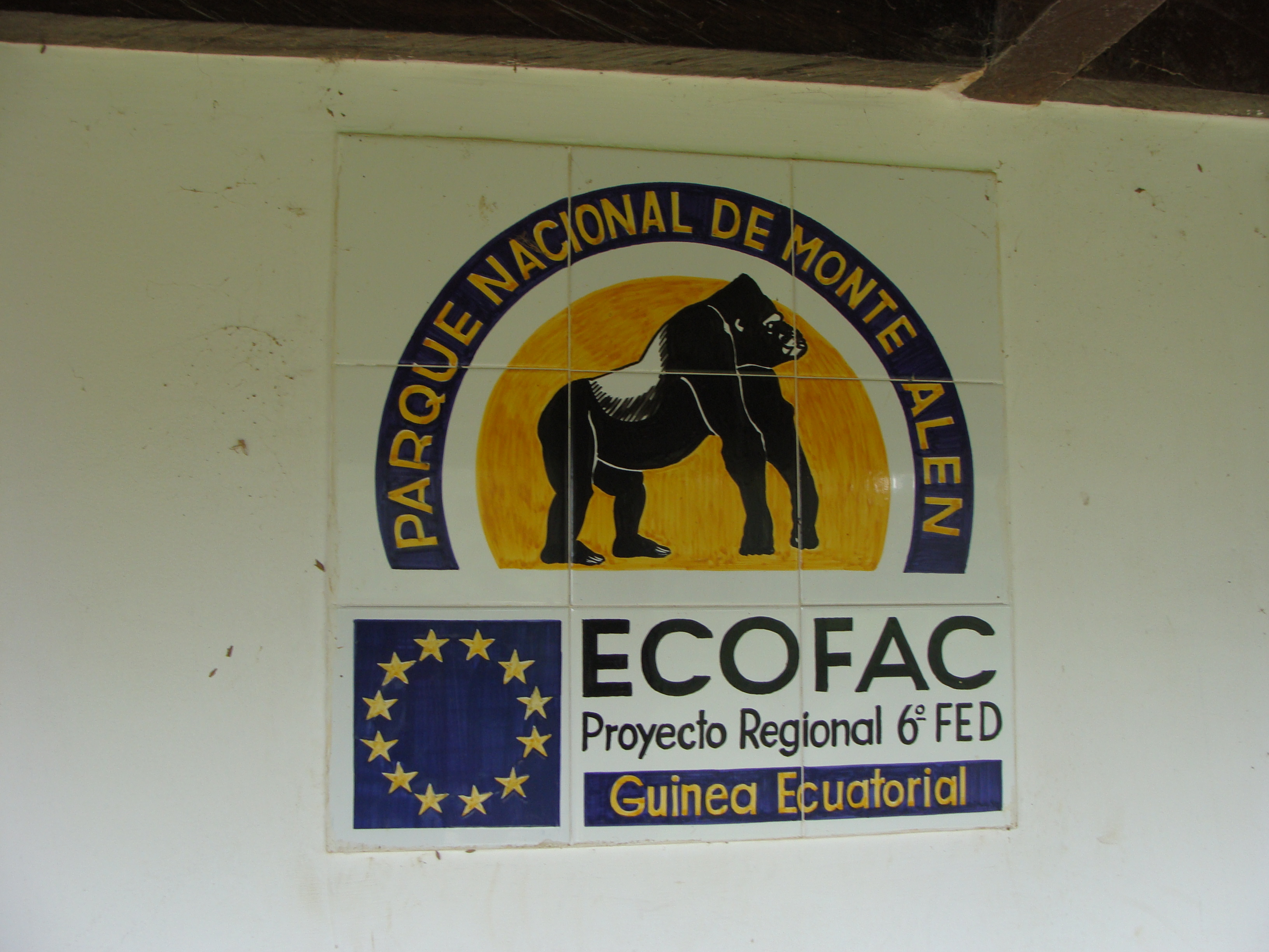 Hinweistafel am Eingang zum Nationalpark Monte Alén in Äquatorialguinea.